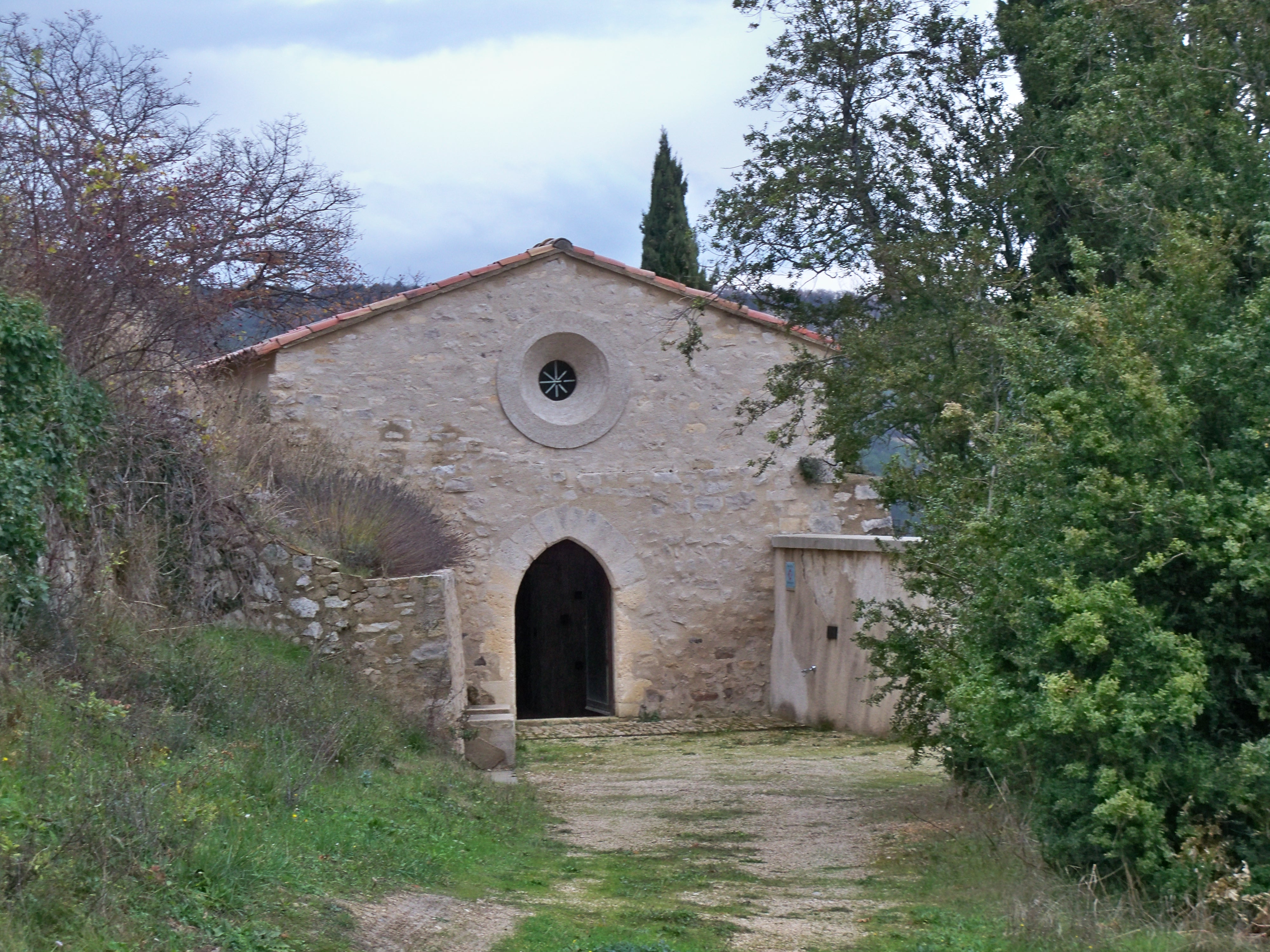 Chapelle Saint Didier à Sainte Croix à Lauze (04)